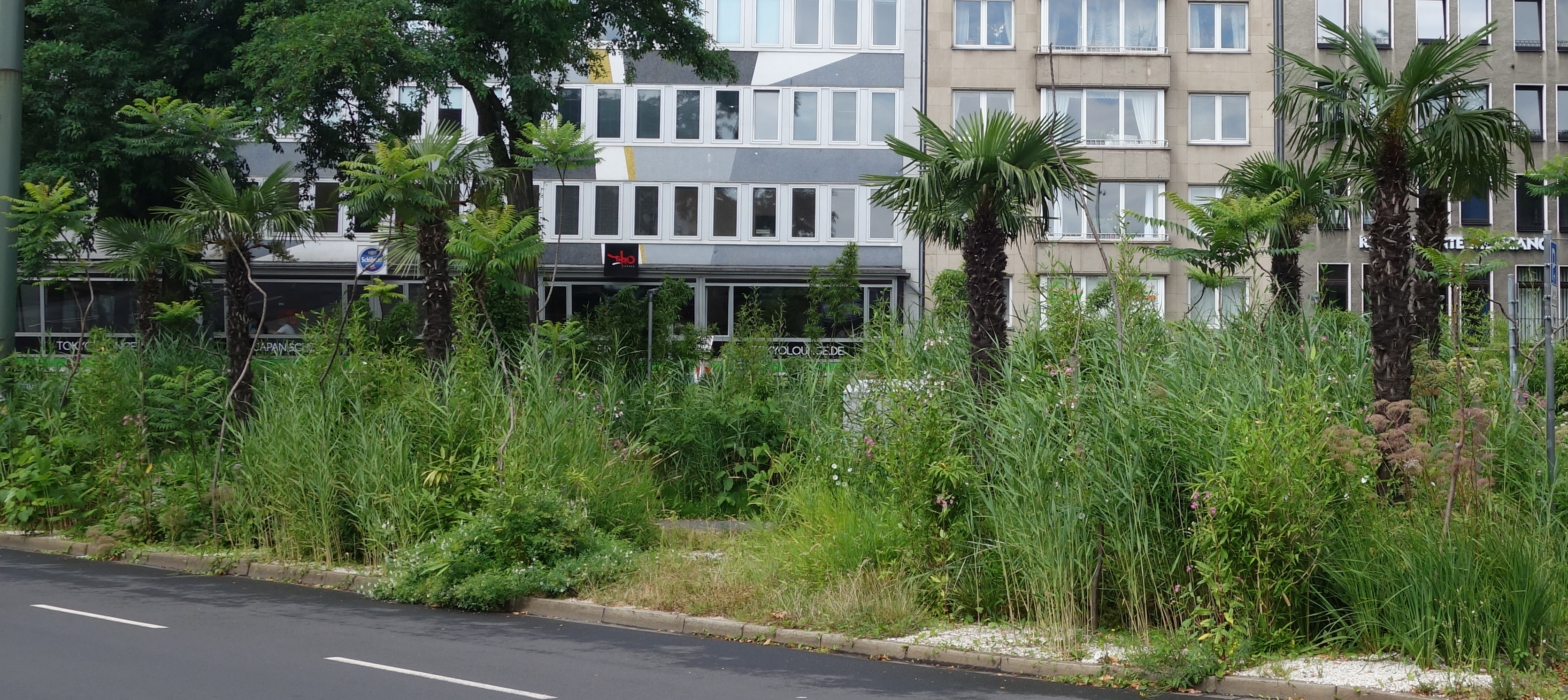 Düsseldorf, Ernst-Reuter-Platz, Blickrichtung Nord. Gestaltung Tita Giese. Zwei Jahre nach der Umgestaltung des Platzes, Ende August 2014.